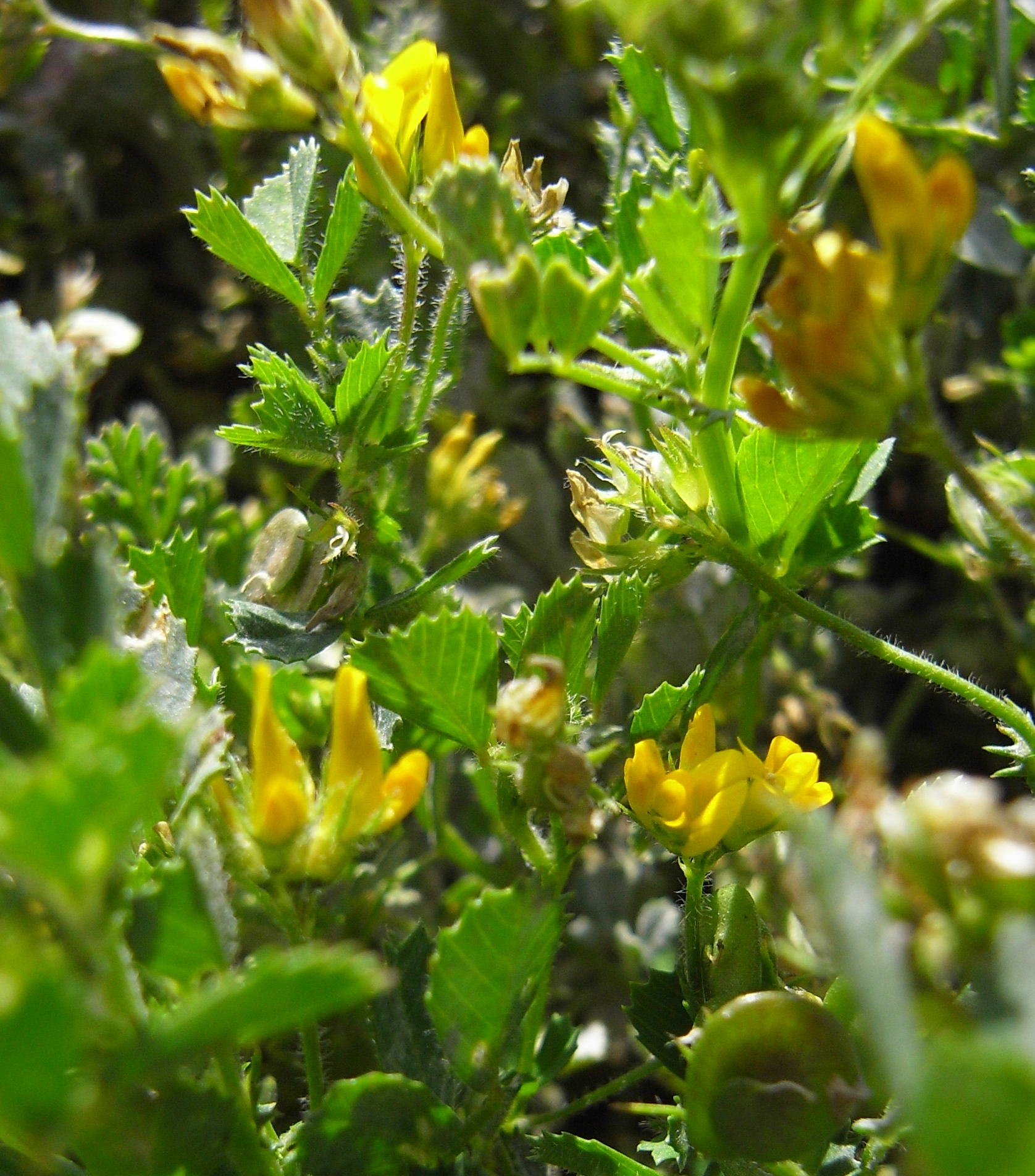 batch: Unbestimmt, Tunesien, April